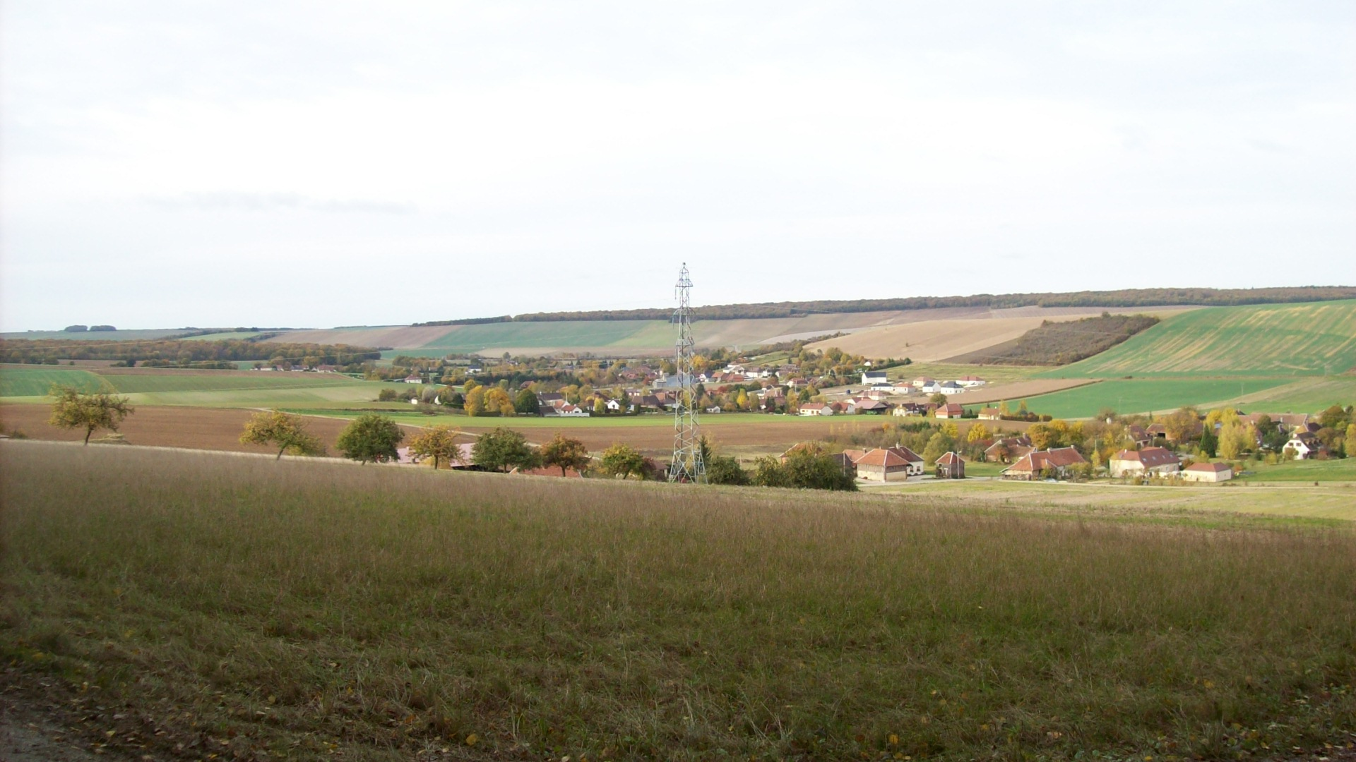 Village de Messon